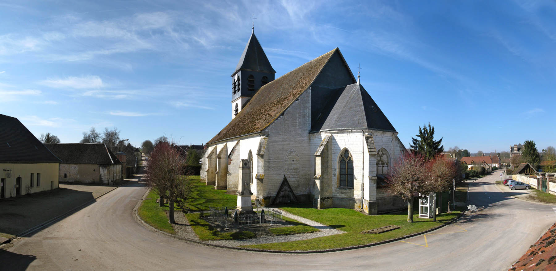 Panorama de Chennegy